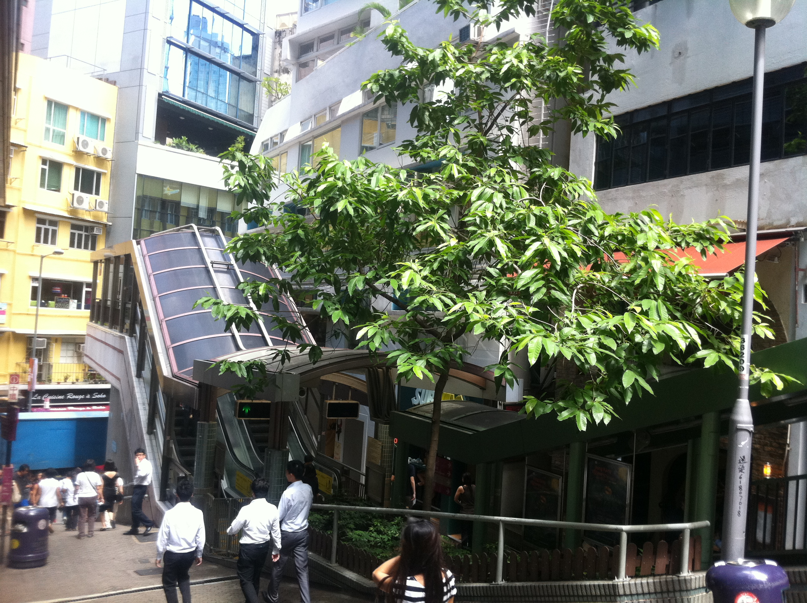 中文（香港）: 中環